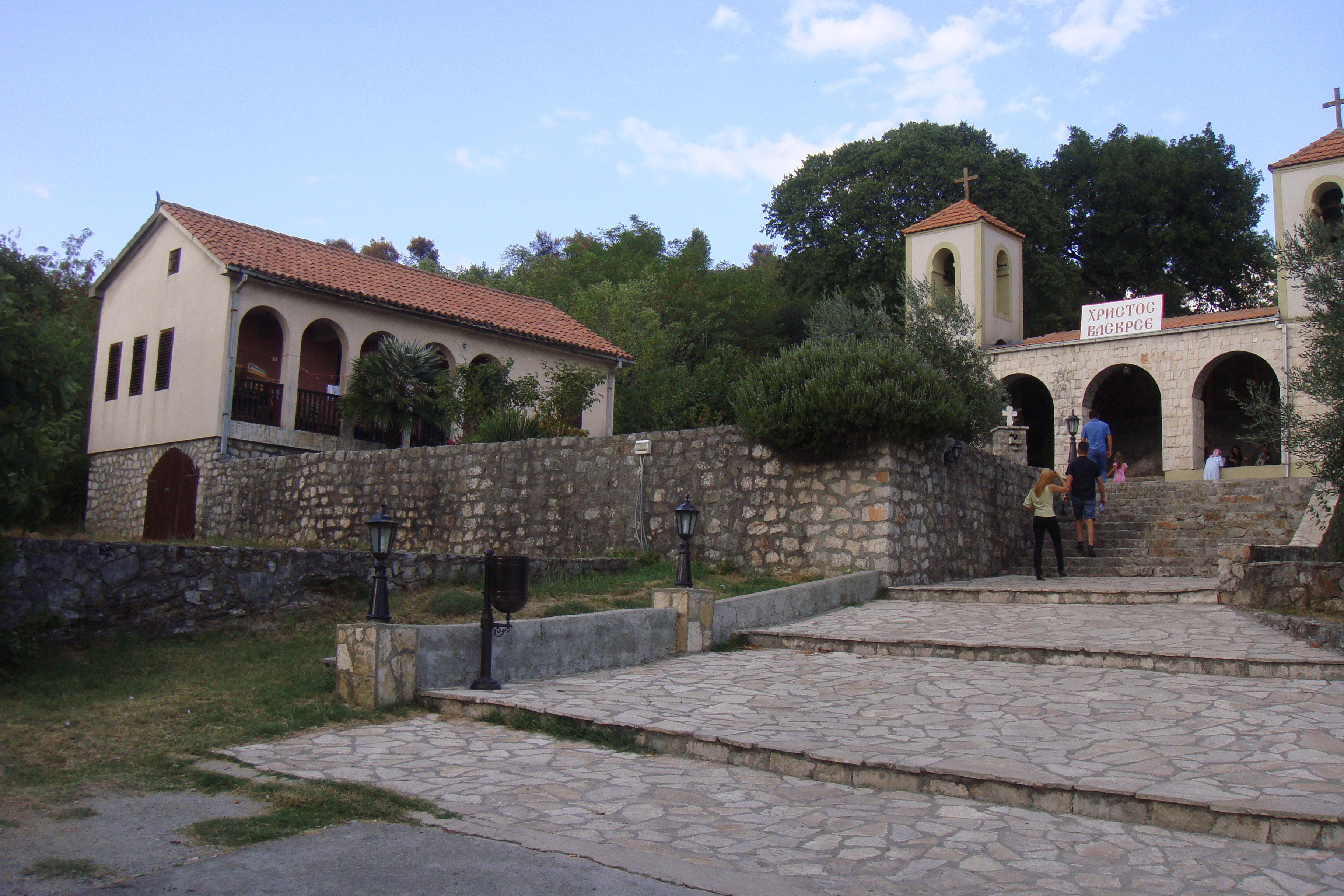 Manastir Dajbabe